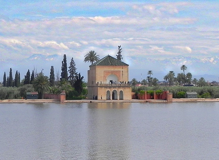 L'edificio ai bordi dello specchio d'acqua all'interno del Giardino della Menara, sullo sfondo la catena Montuosa dell'Atlante